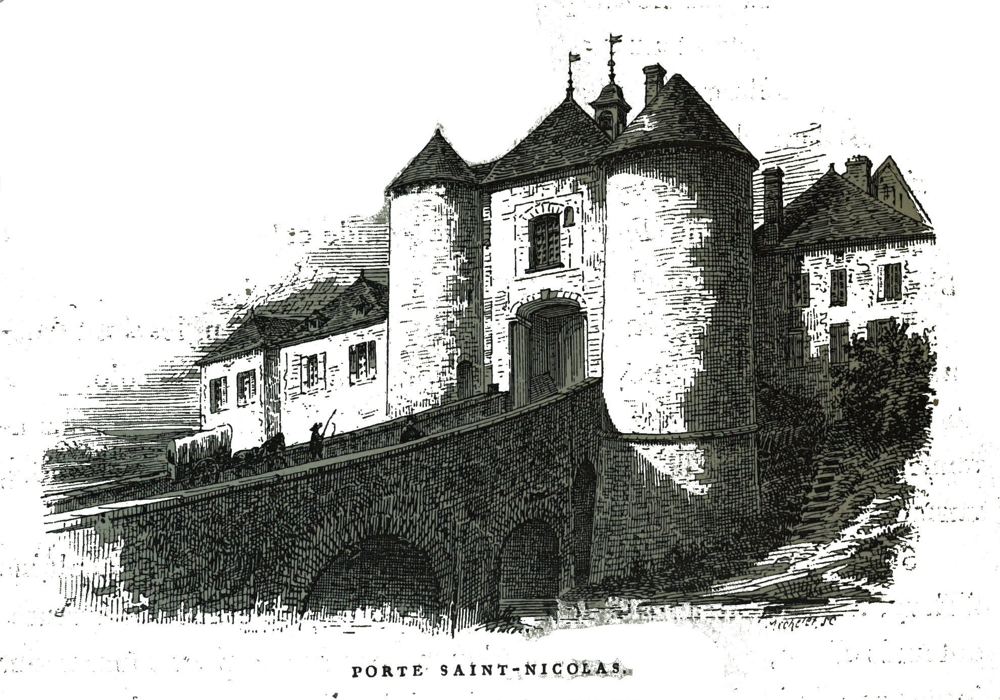 par un dessin de Fichot.